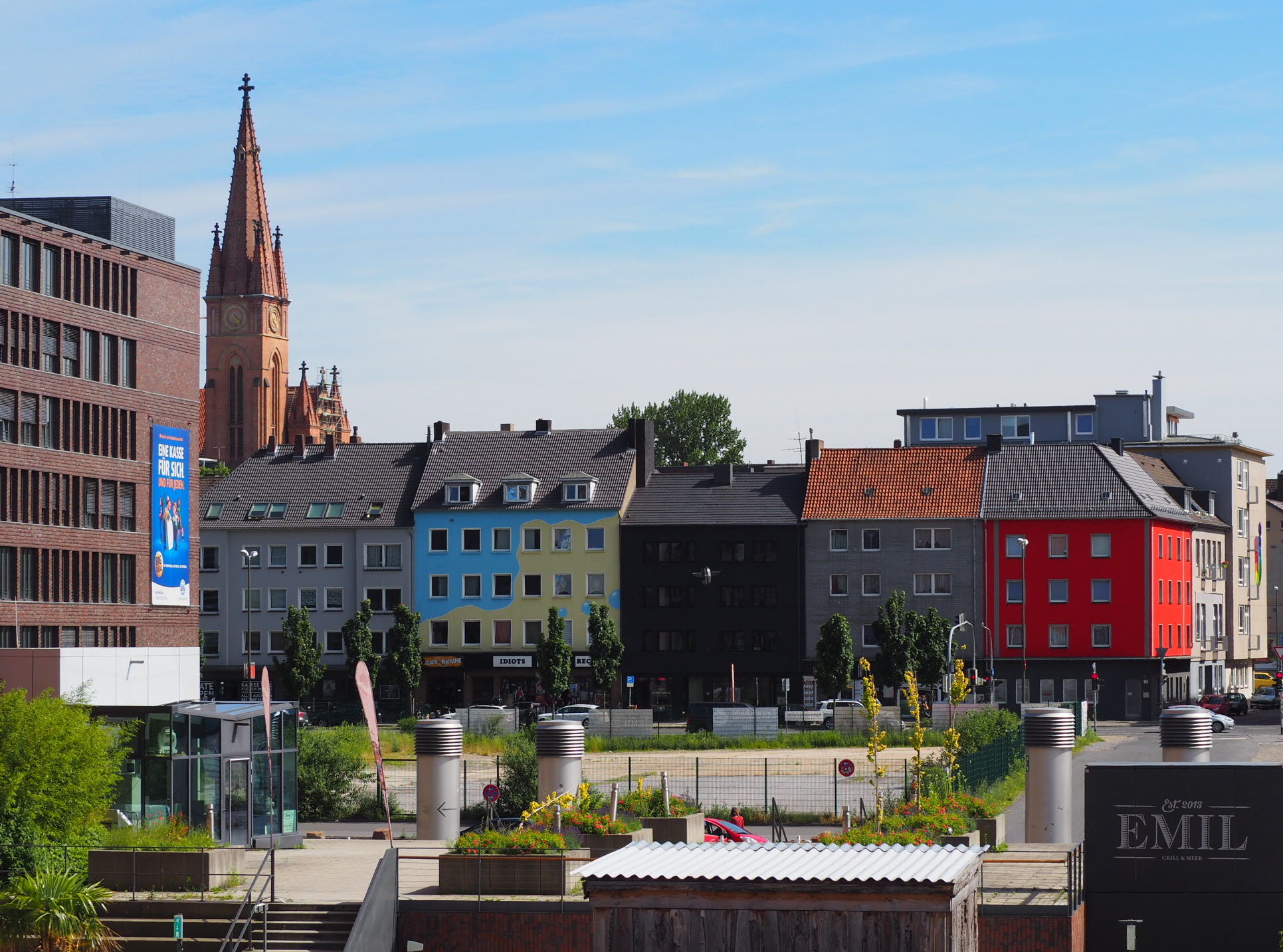 Stadtumbaugebiet Unionviertel Dortmund - Rheinischestraße